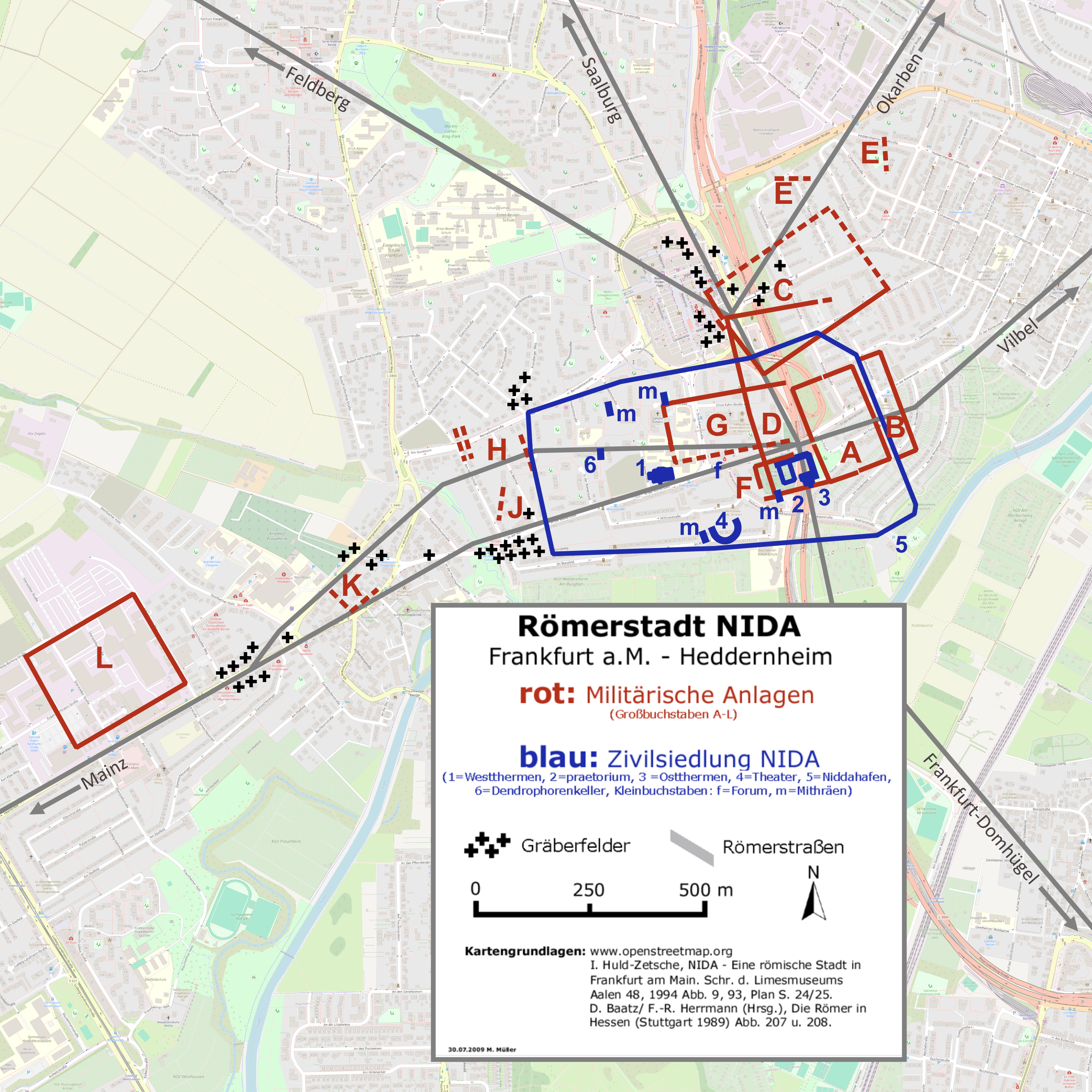 Lageplan der Kastelle und Zivilsiedlungen römischer Zeit in Frankfurt-Heddernheim.